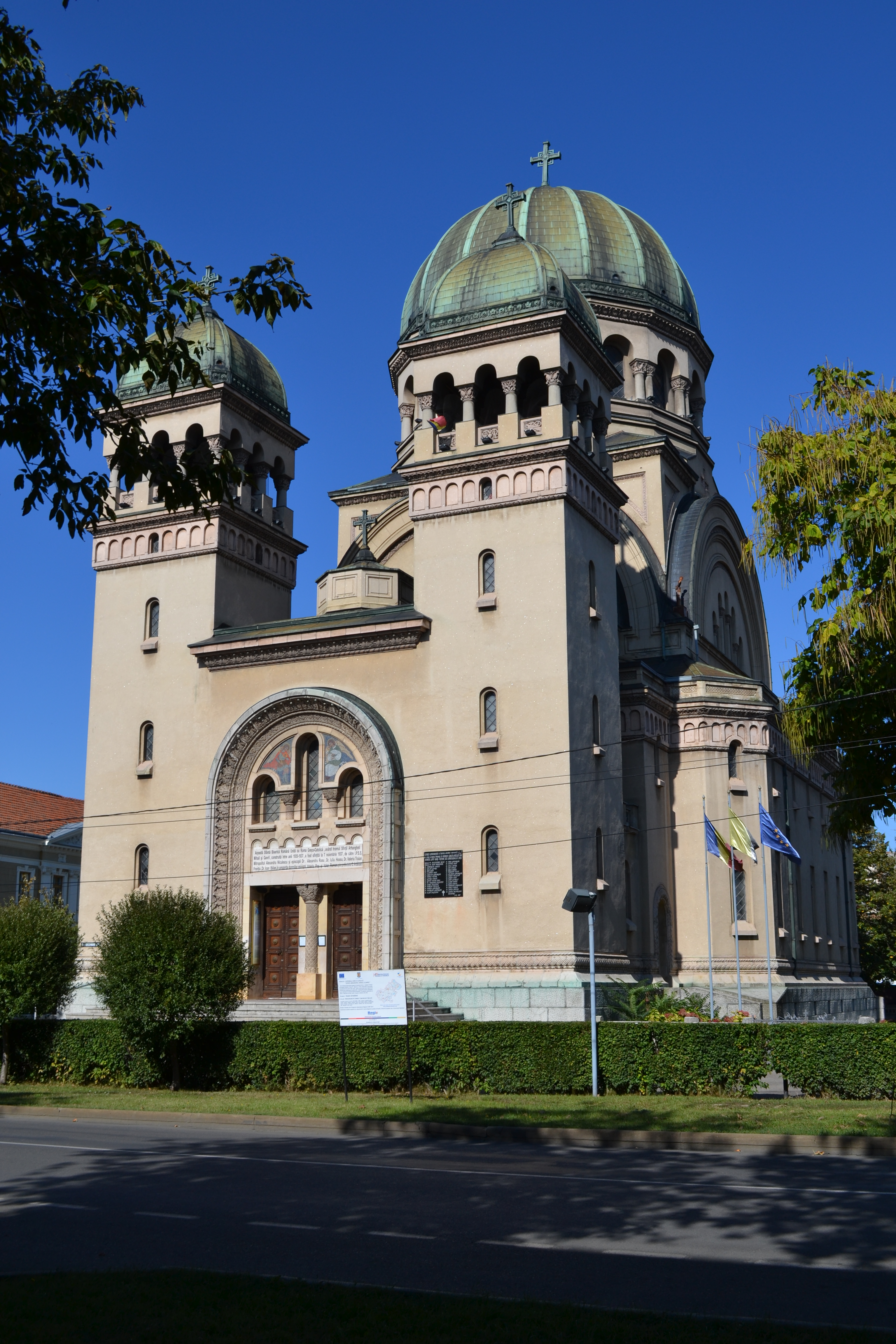 Biserica Sfintii Arhangheli Mihail si Gavriil Satu Mare